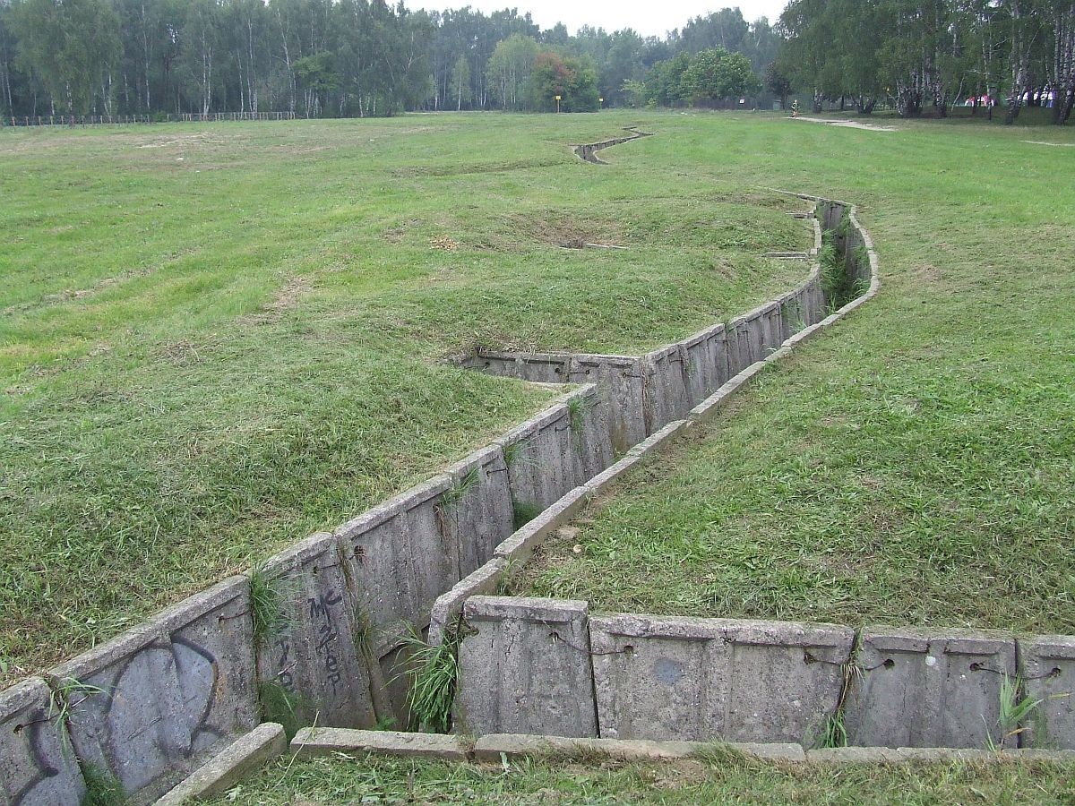 Transzeja, WAT, Bemowo, Warsaw